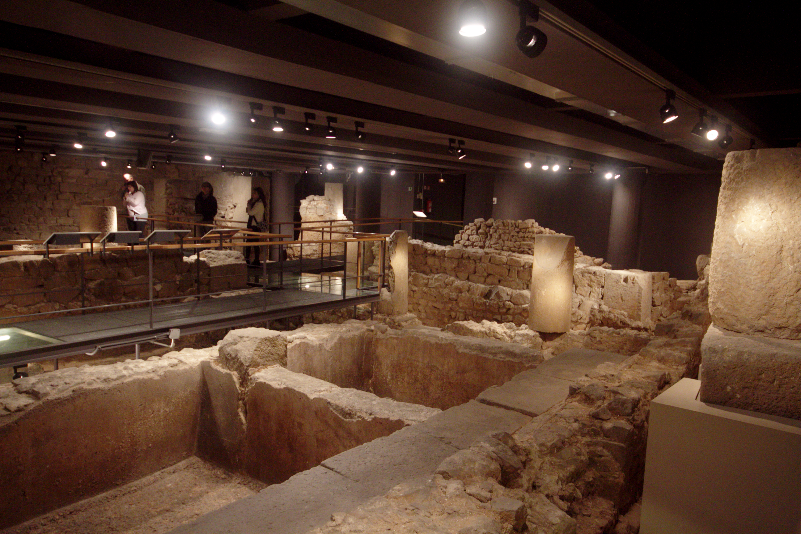 Museu d'Història de la Ciutat de Barcelona